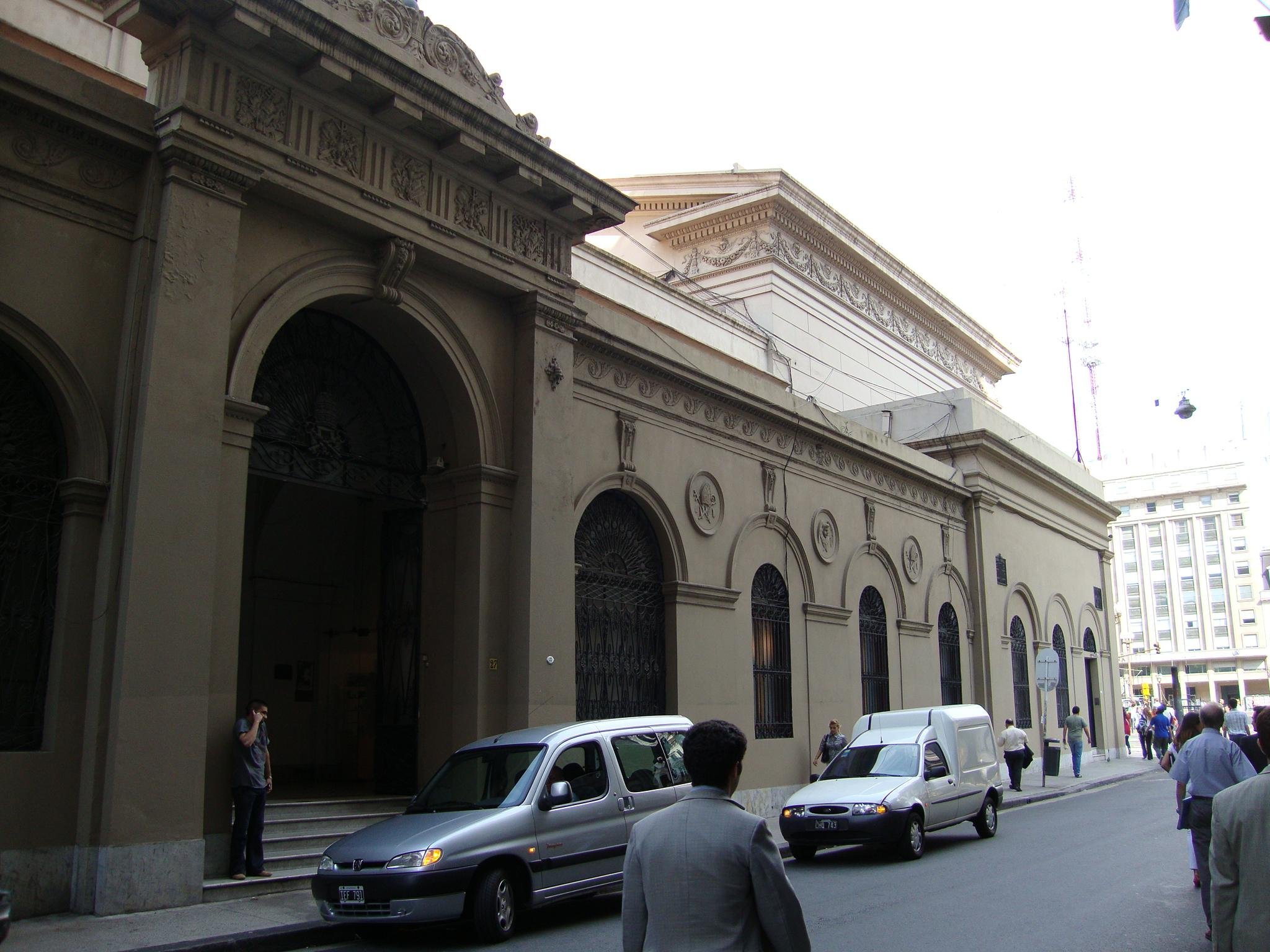 Vista de la fachada del lateral sobre la calle San Martín de la Catedral Metropolitana de Buenos Aires, de estilo italianizante.